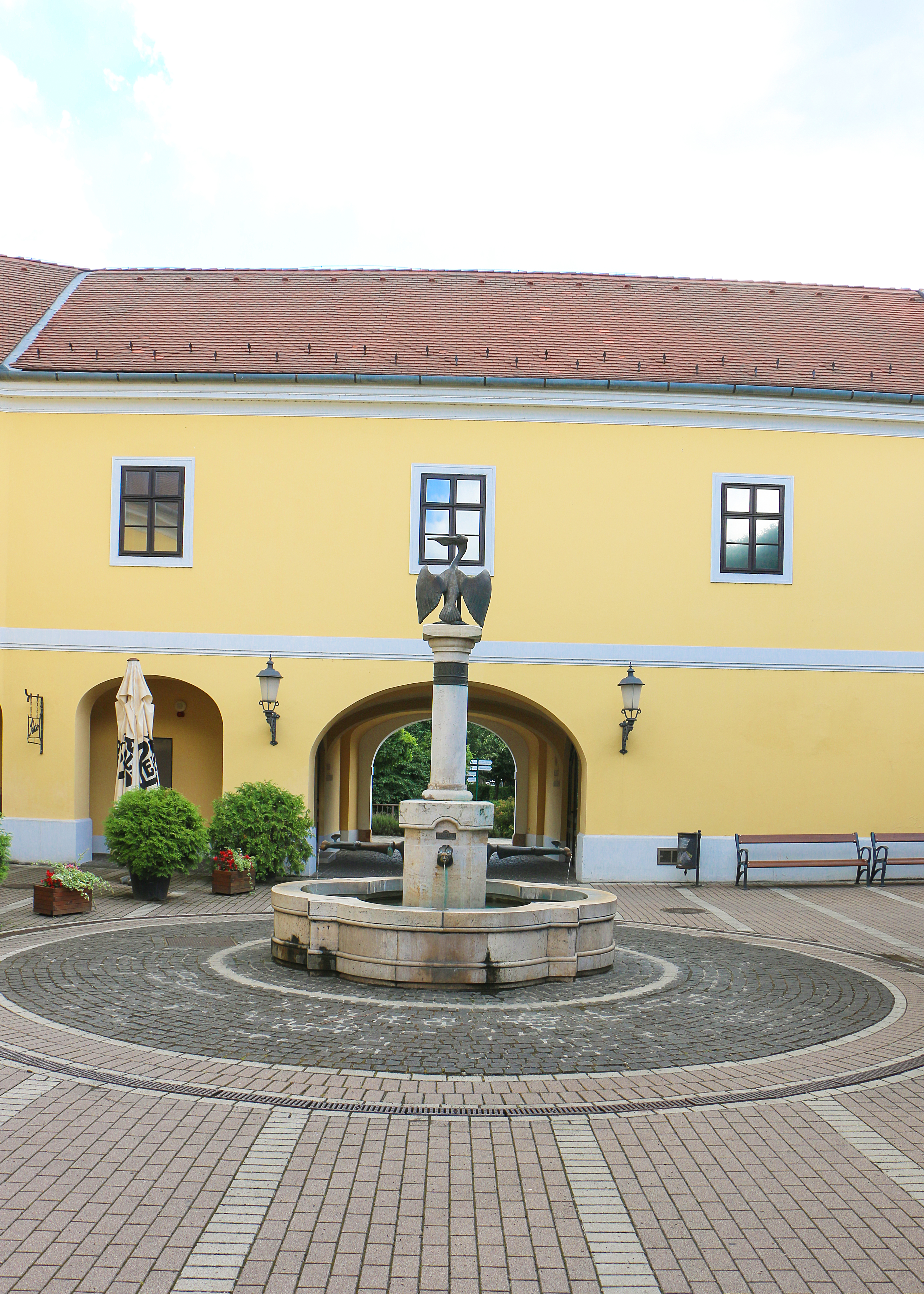 A pelikános kút Gödöllőn a Városi Múzeum udvarán. Asszonyi Tamás alkotása 2000-ben készült